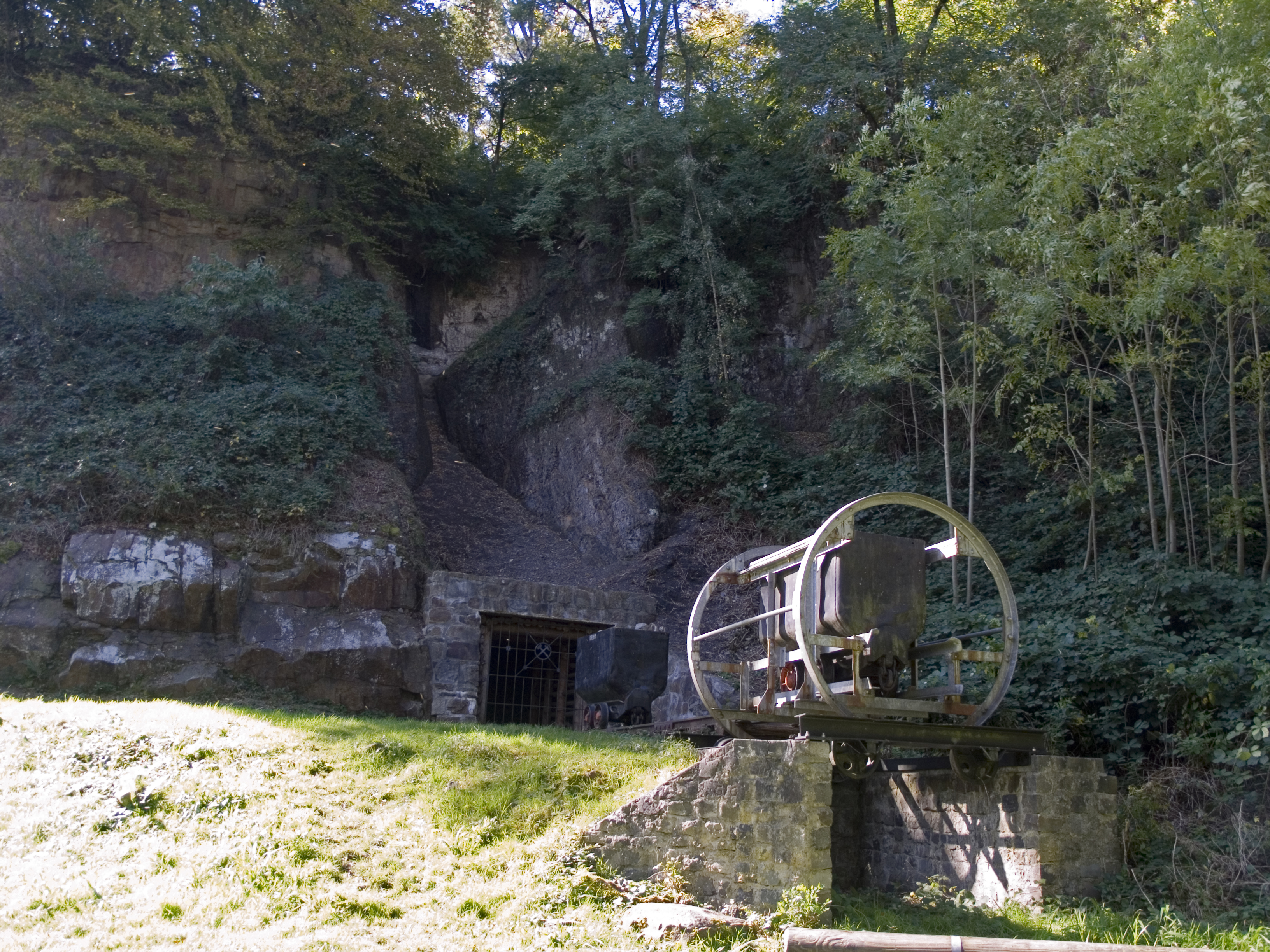 Северный Рейн - Вестфалия, Эссен - старая угольная шахта в Хайзингене